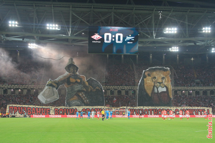 Перформанс на домашнем матче с "Зенитом". Сезон 2015/16 годов